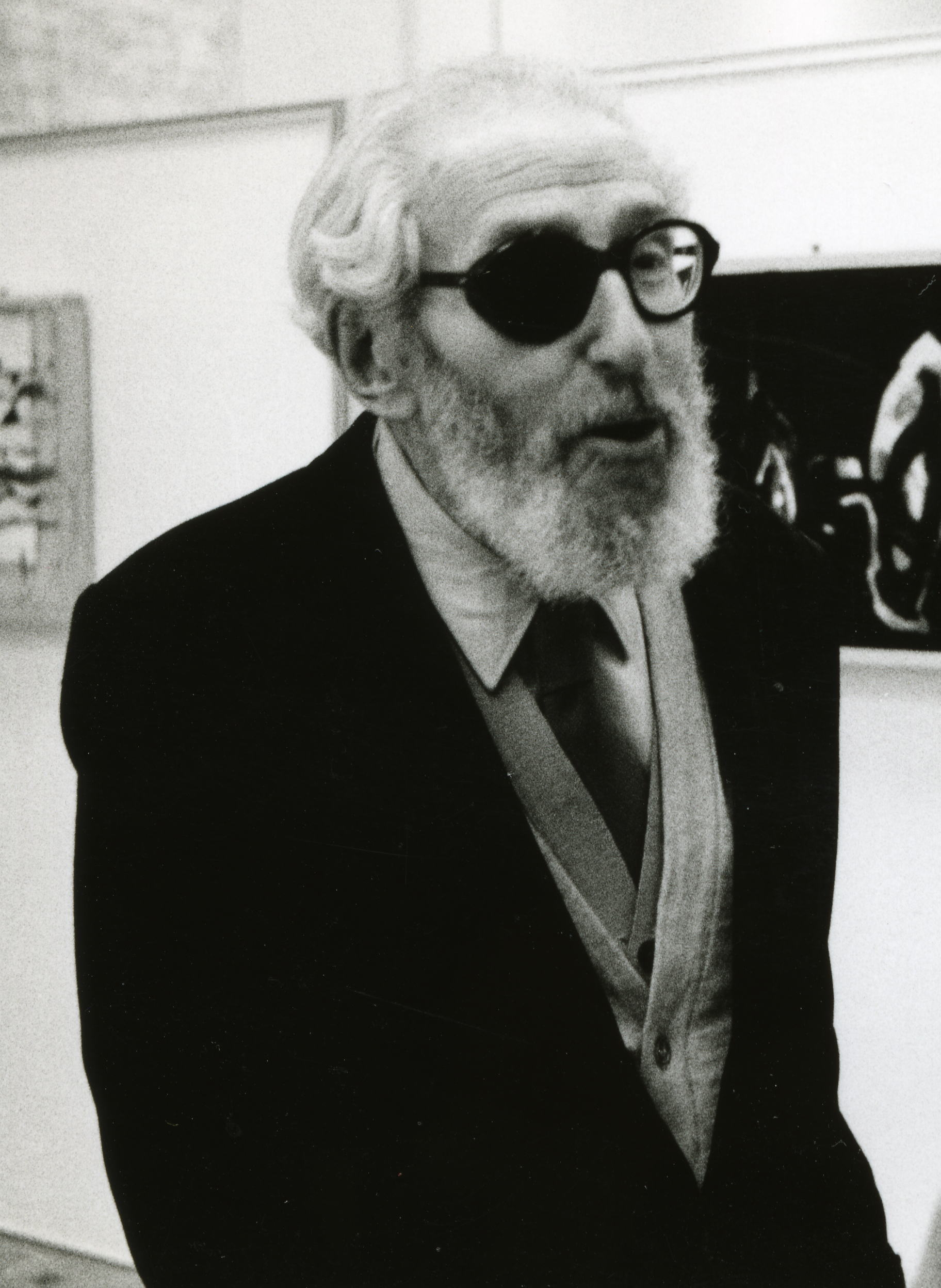 L'écrivain français Claude Aveline lors d'un vernissage à Paris en 1989